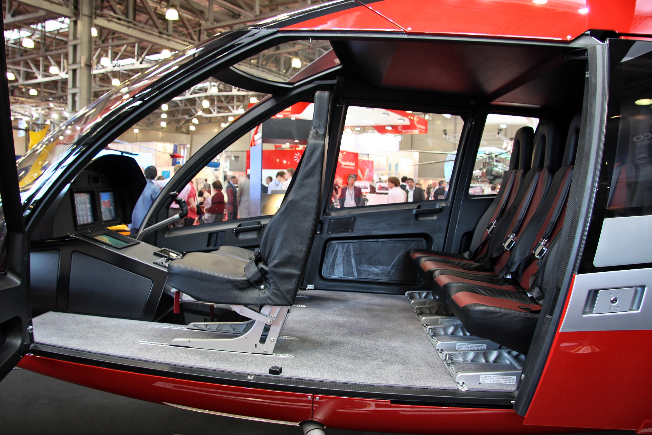 Marenco SKYe SH09 mock-up